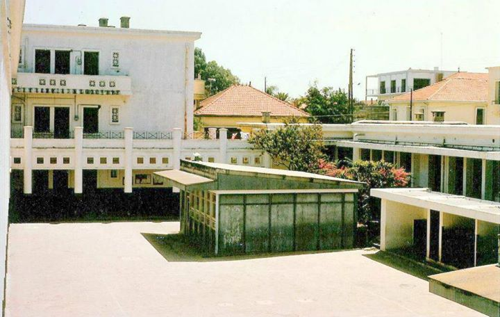 École de Garçons de Thénia avant le séisme de 2003